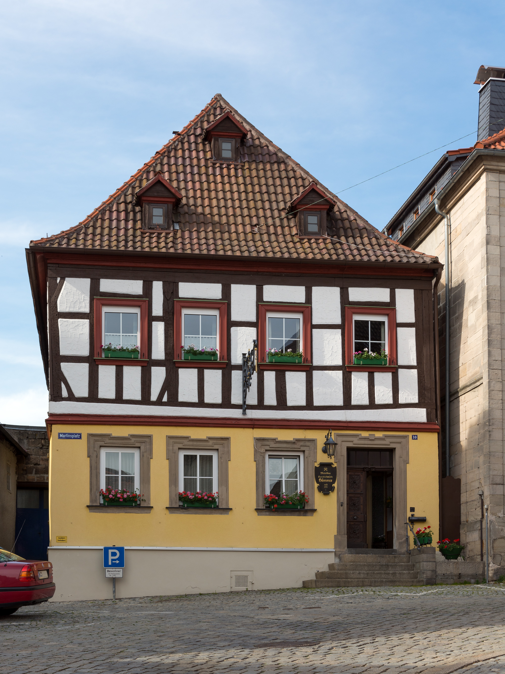 Gebäude Martinsplatz 10 in Kronach.